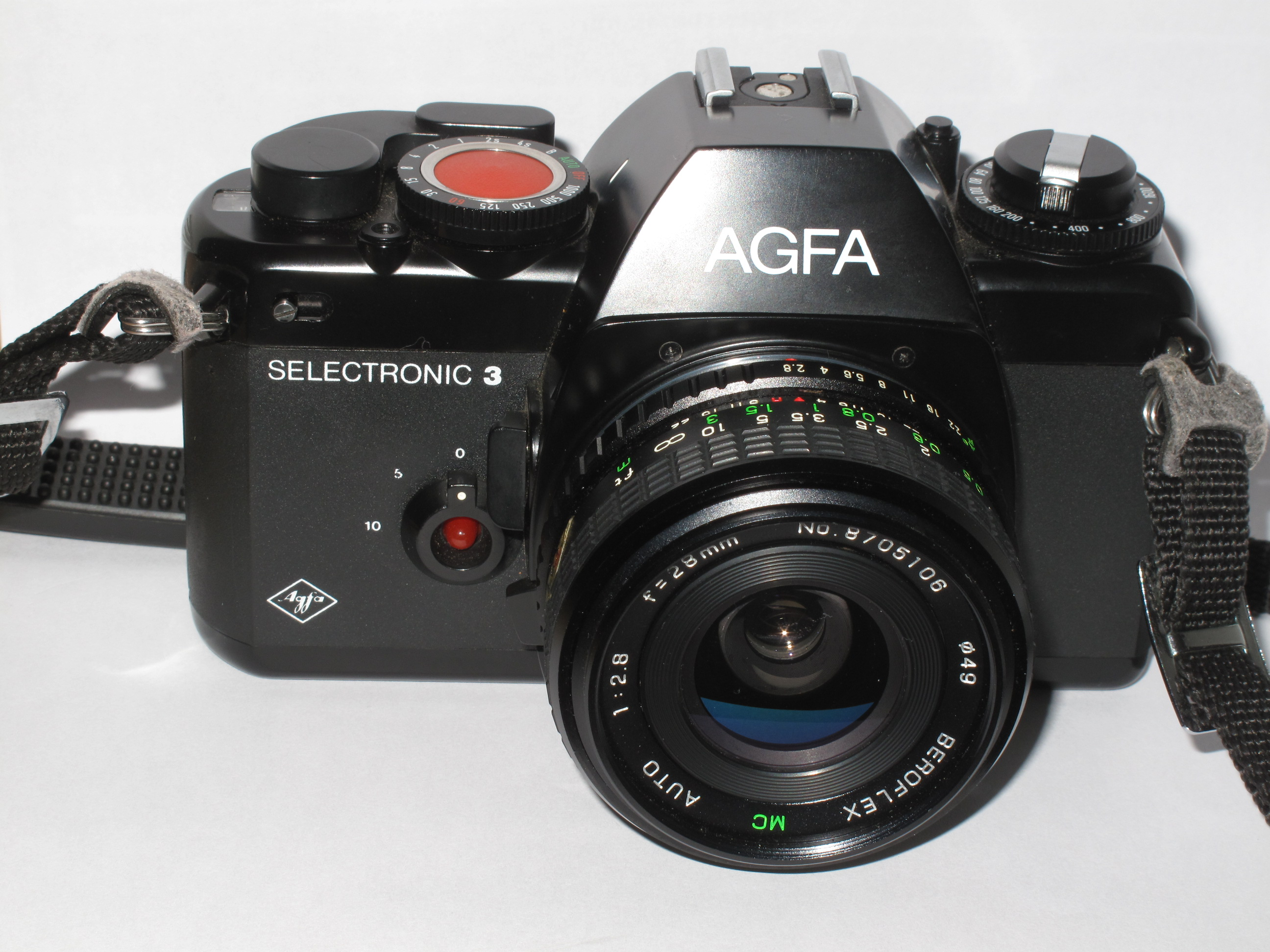 Agfa Selectronic 3 mit Weitwinkelobjektiv 28mm